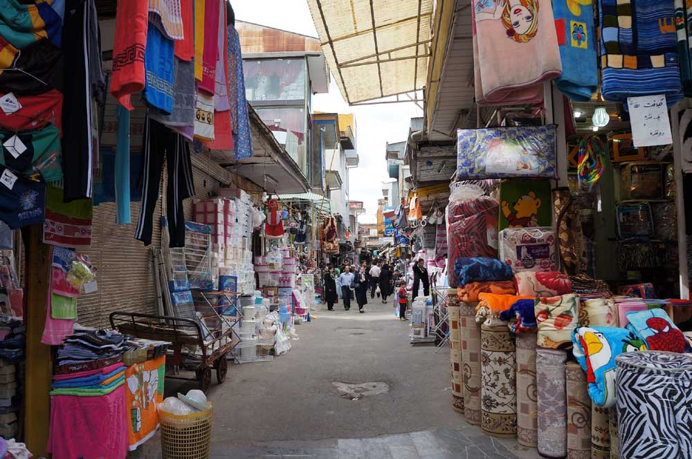 Rasht 2013 (10)